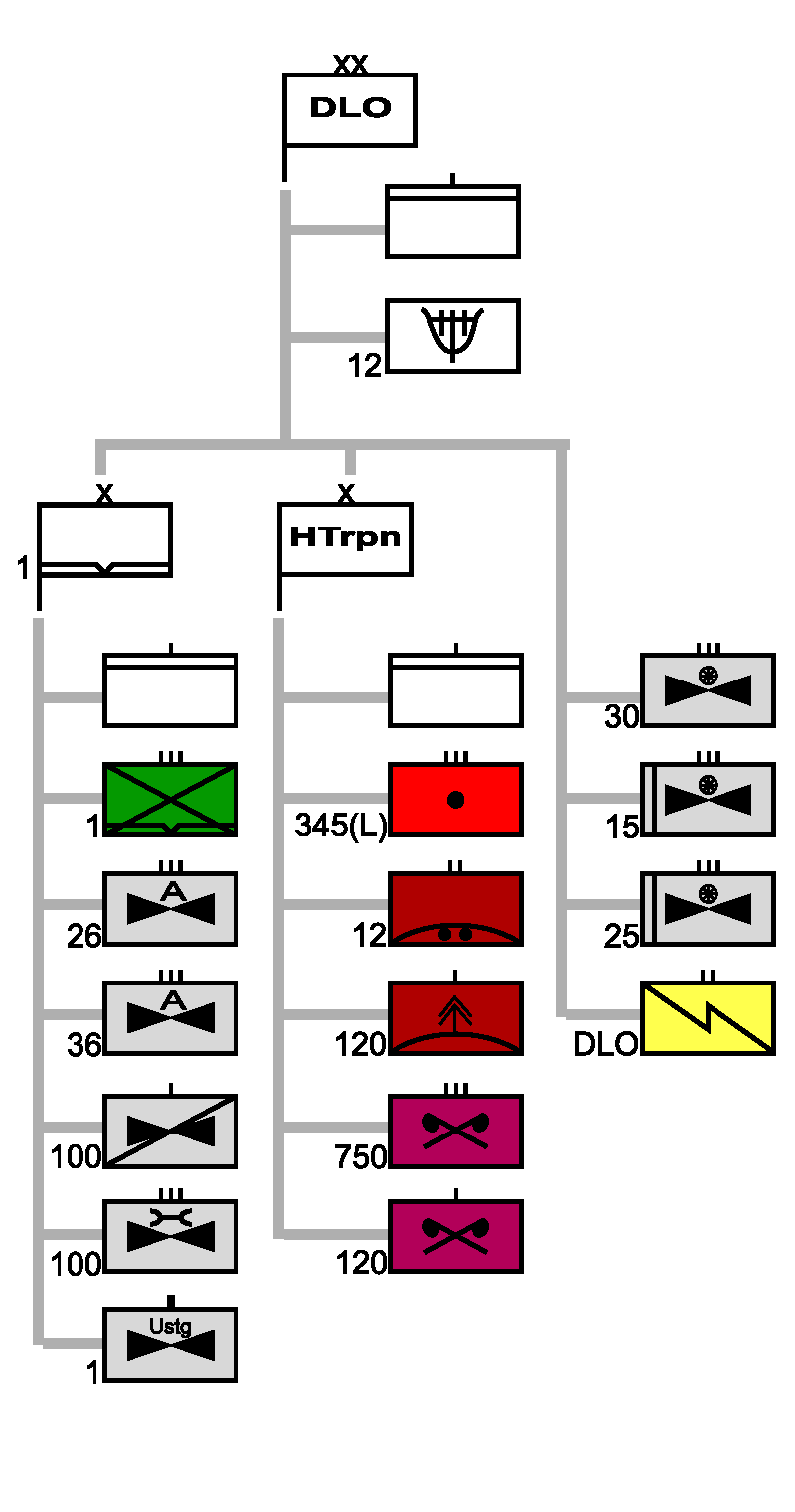 Gliederung DLO im deutschen Heer.